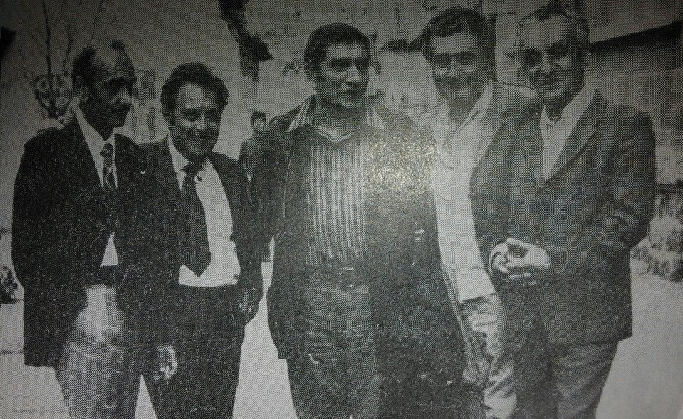 Մի խումբ հայֆիլմցիներ.......